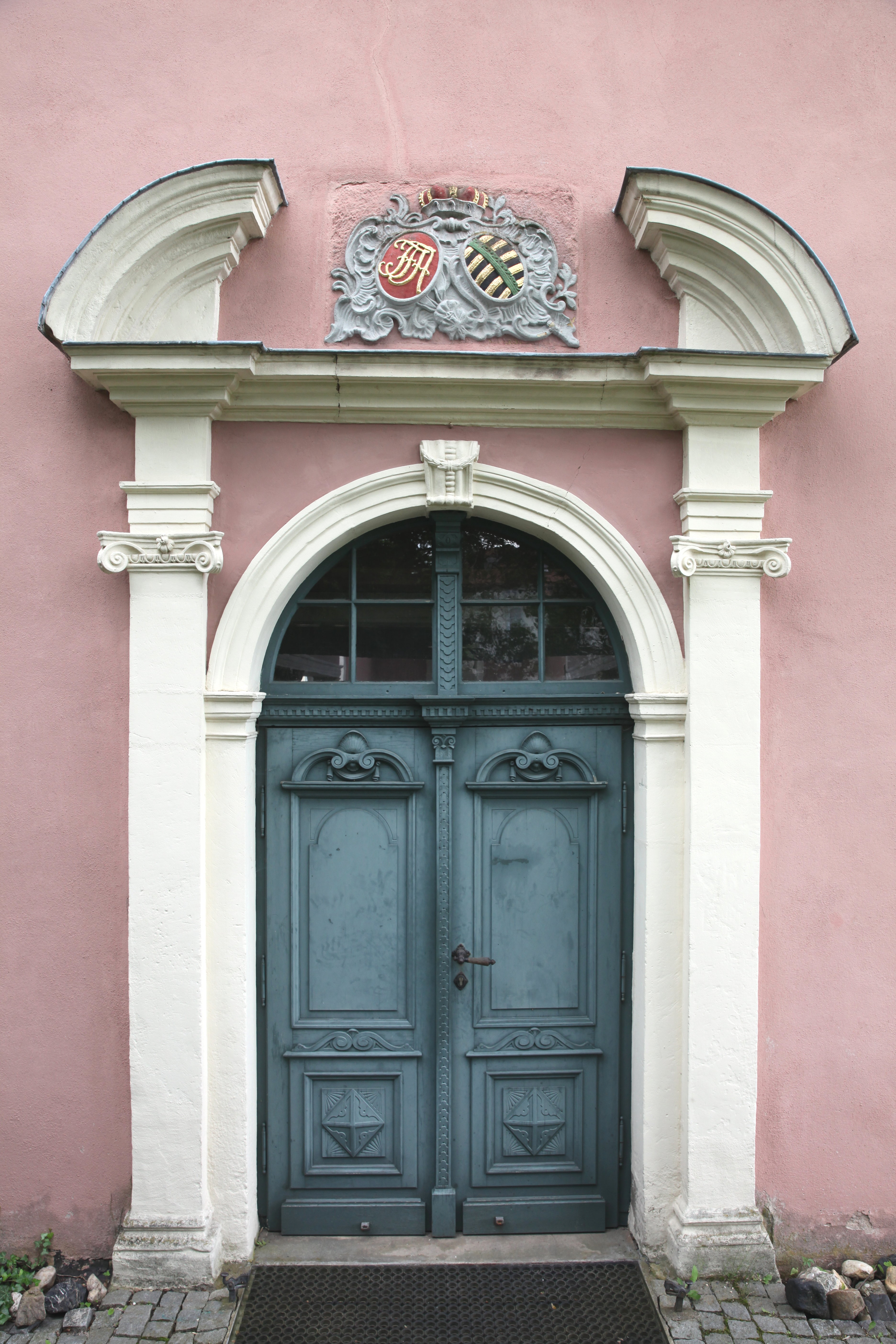 Eingangsportal, Evangelische Kirche St. Nikolaus in Weitramsdorf